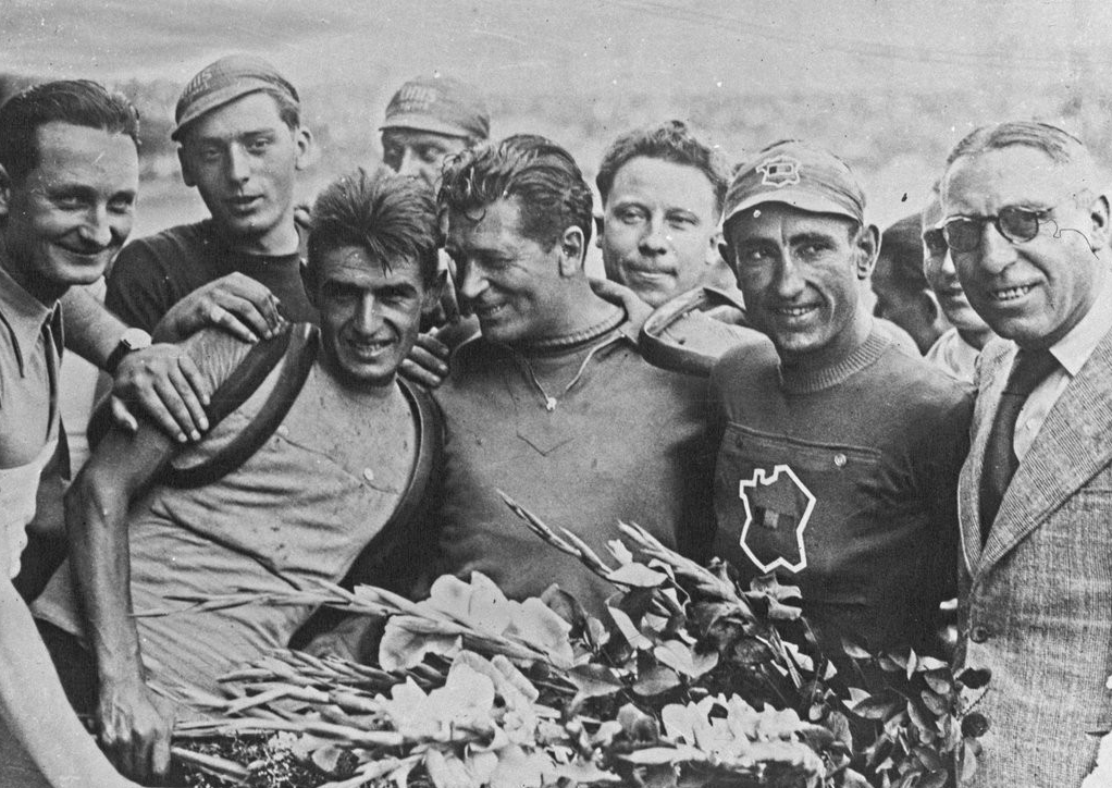 Photographie des deux premiers coureurs du Tour de France 1939 posant avec le célèbre acteur Albert Préjean.